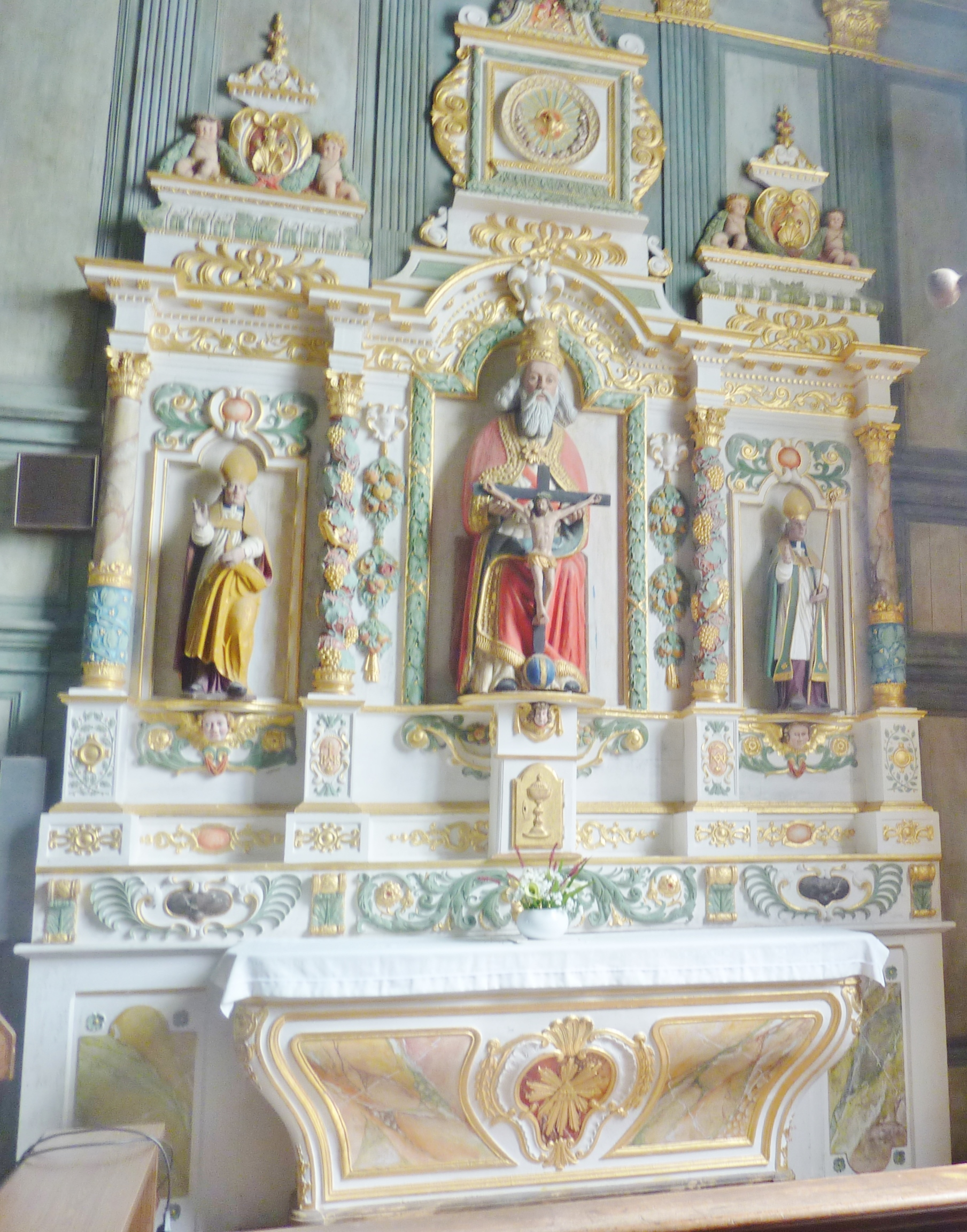 Dirinon : église Sainte-Nonne, le retable de la Trinité et ses colonnes torses date du XVIIème siècle